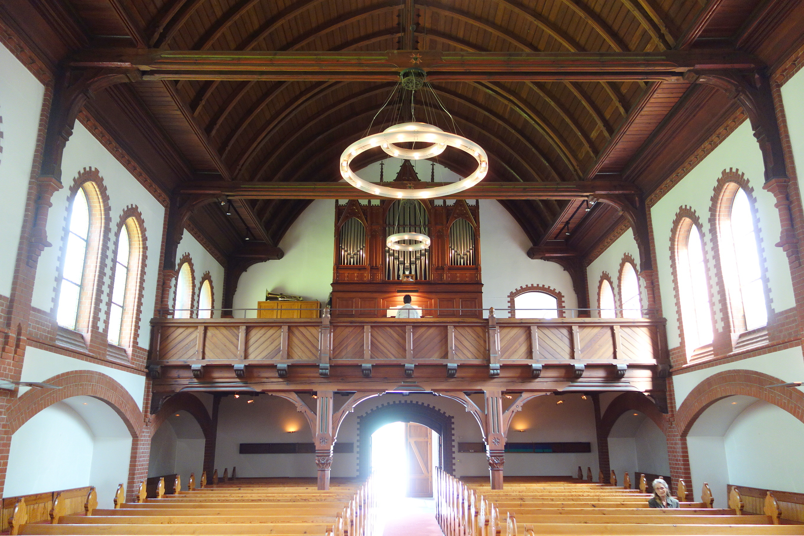 Orgel der Stockelsdorfer Kirche, Kreis Ostholstein, Schleswig-Holstein, Deutschland